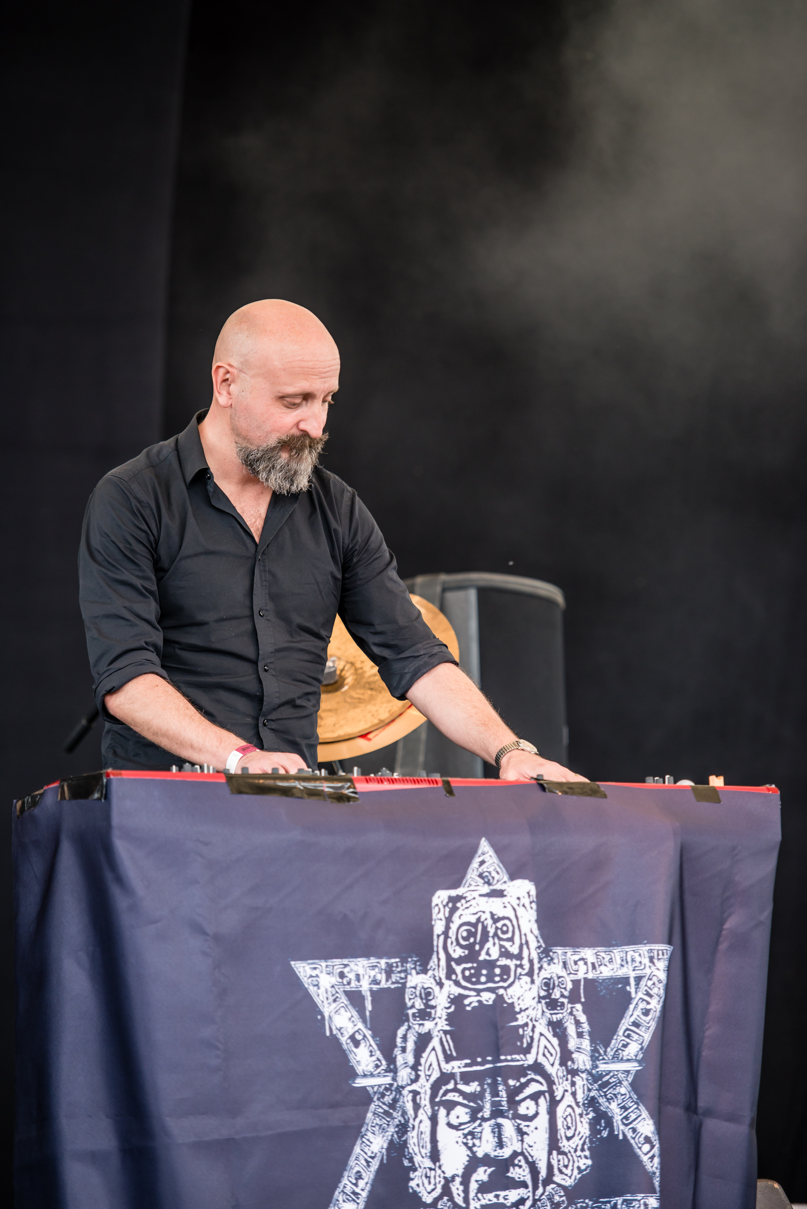 'Rock Hard Festival 2015; Gelsenkirchen Amphitheater': 'Avatarium'